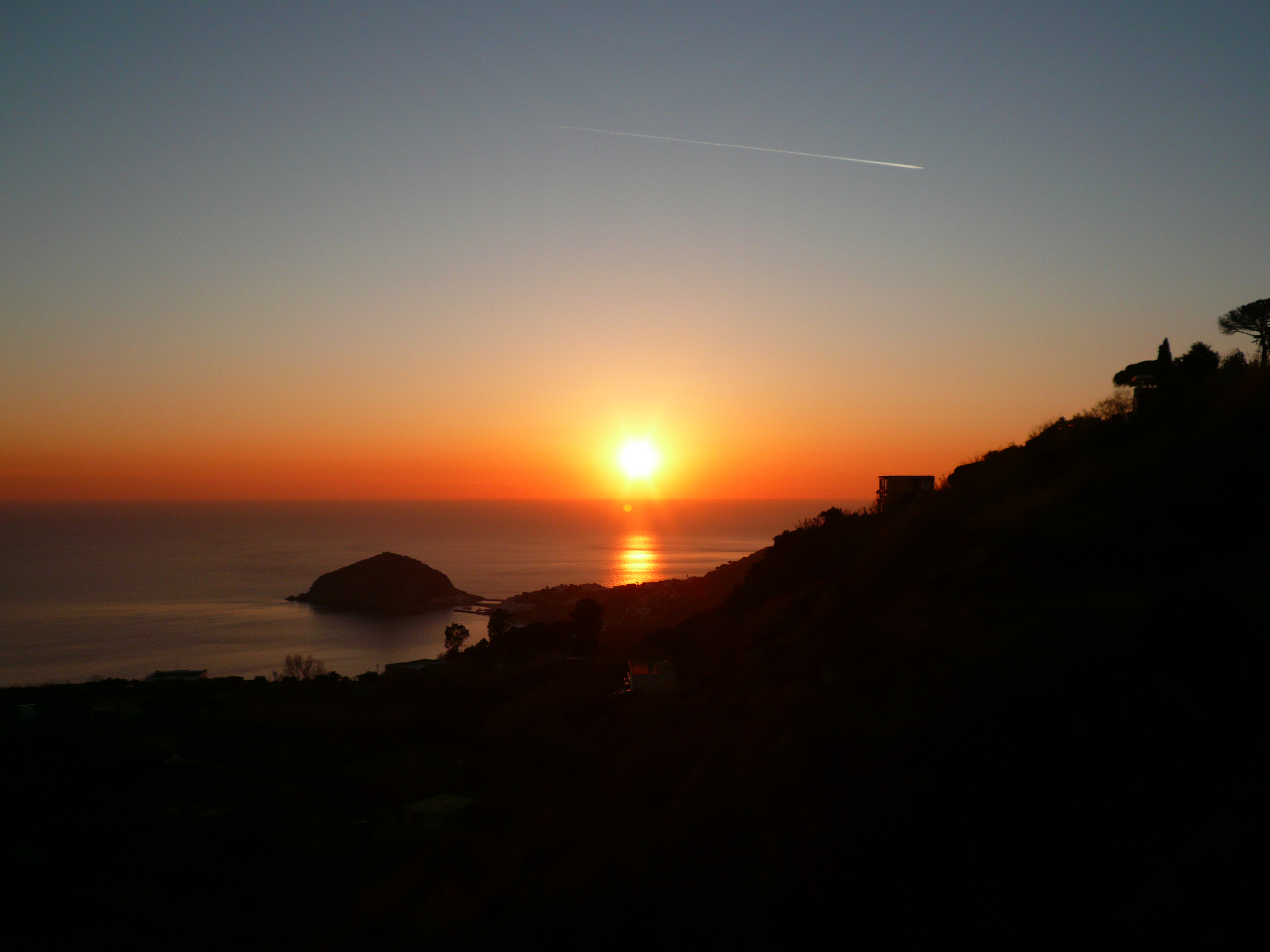 tramonto sul comune di Barano (isola d'Ischia). Sul mare è ben visibile il promontorio di Sant' Angelo. Nel cielo la scia di un aeroplano